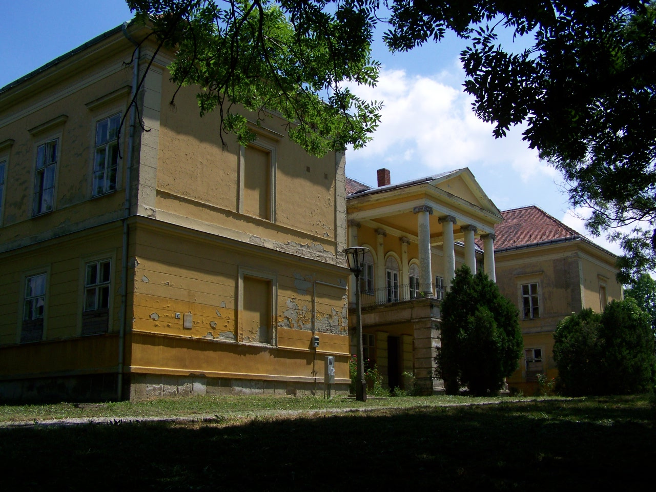 Lamberg-kastély (Bodajk, Petőfi Sándor utca 93.)